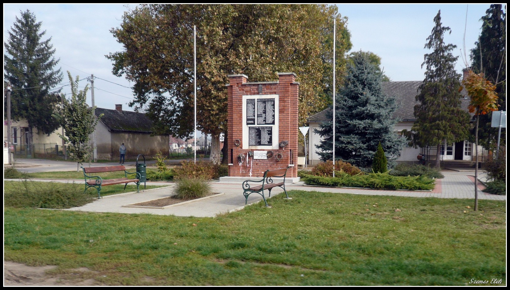 Világháborús emlékmű, Kántorjánosi, Hungary